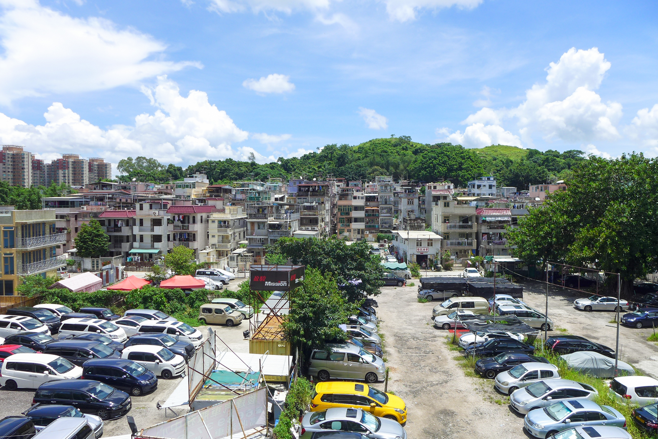 Tung Tau Tsuen